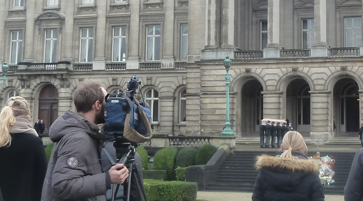 Solemn and Royal Funeral of Her Most Catholic Majesty the Queen Dowager of Belgium, née Countess de Mora y Aragon 2014